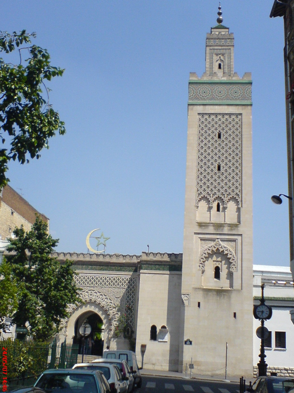 mosquée de paris